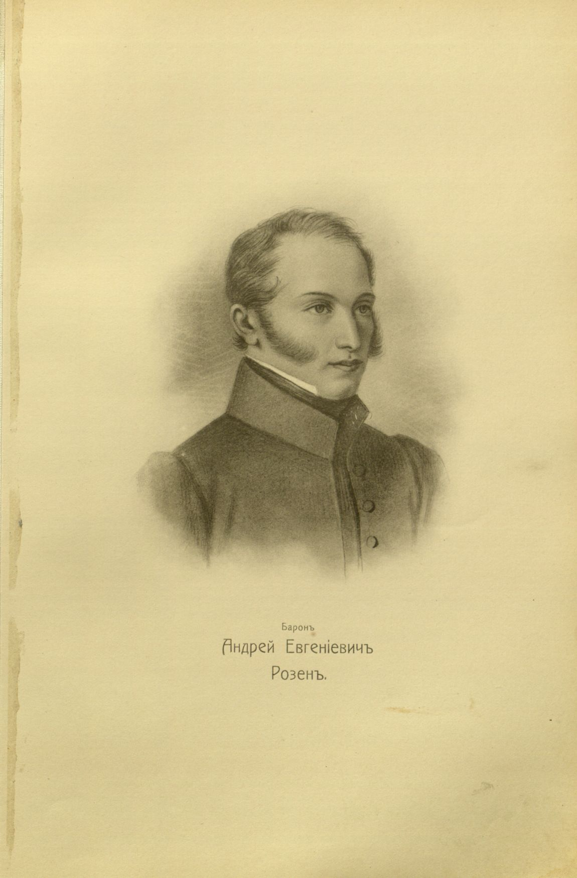 Андрей Розен